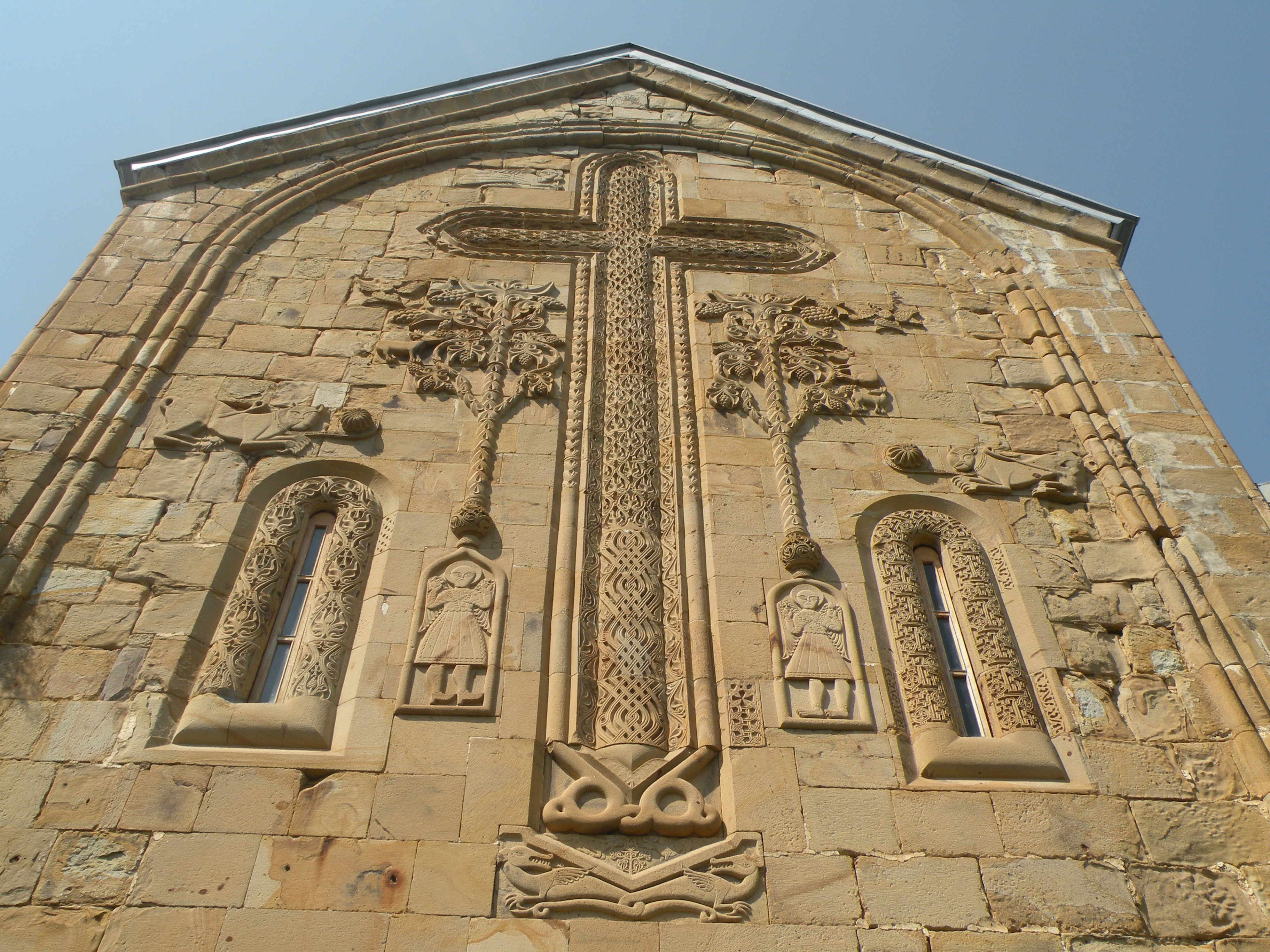 façade est